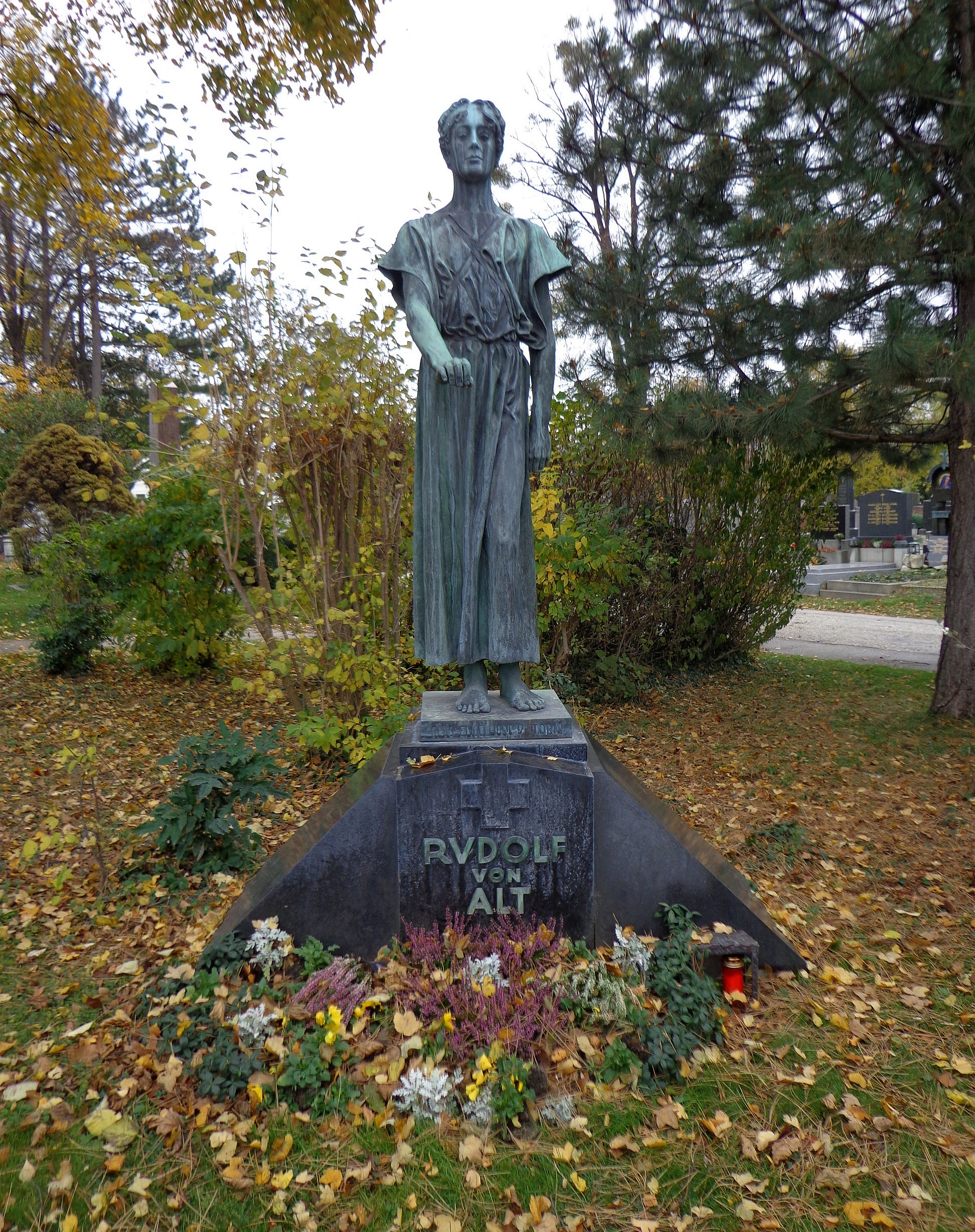 Wiener Zentralfriedhof - Gruppe 14A, Ehrengrab von Rudolf von Alt